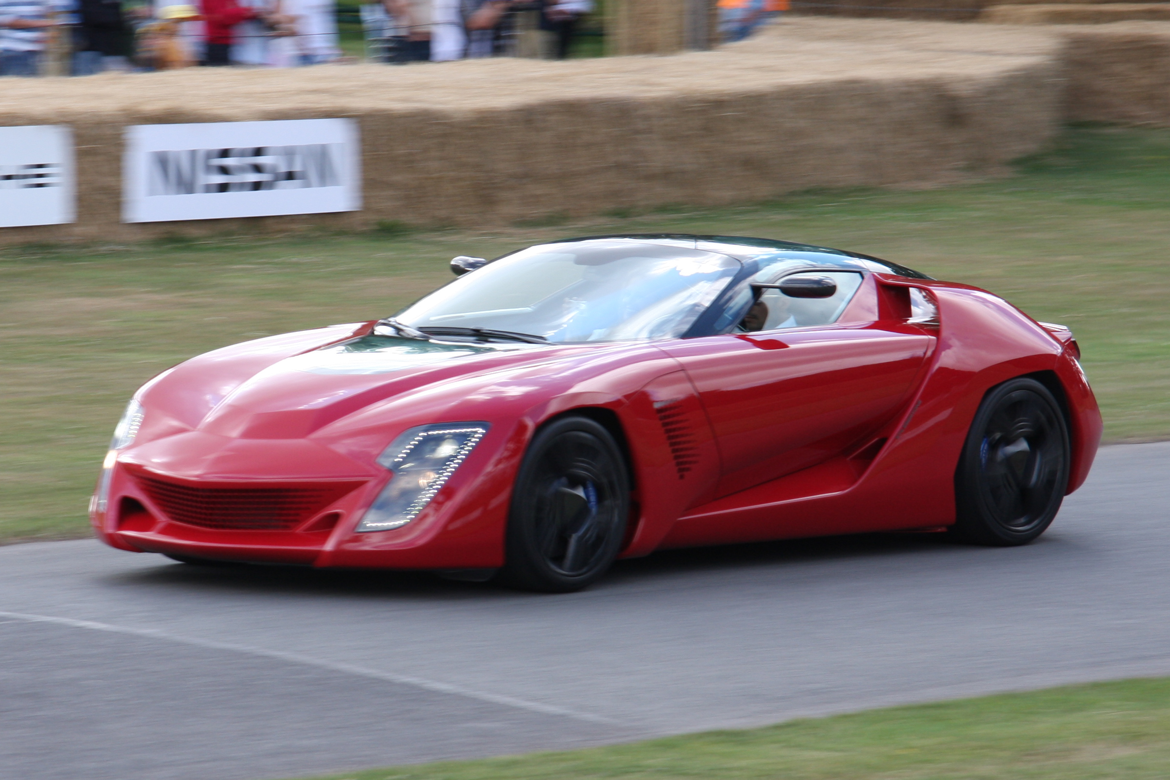 Goodwood 2009